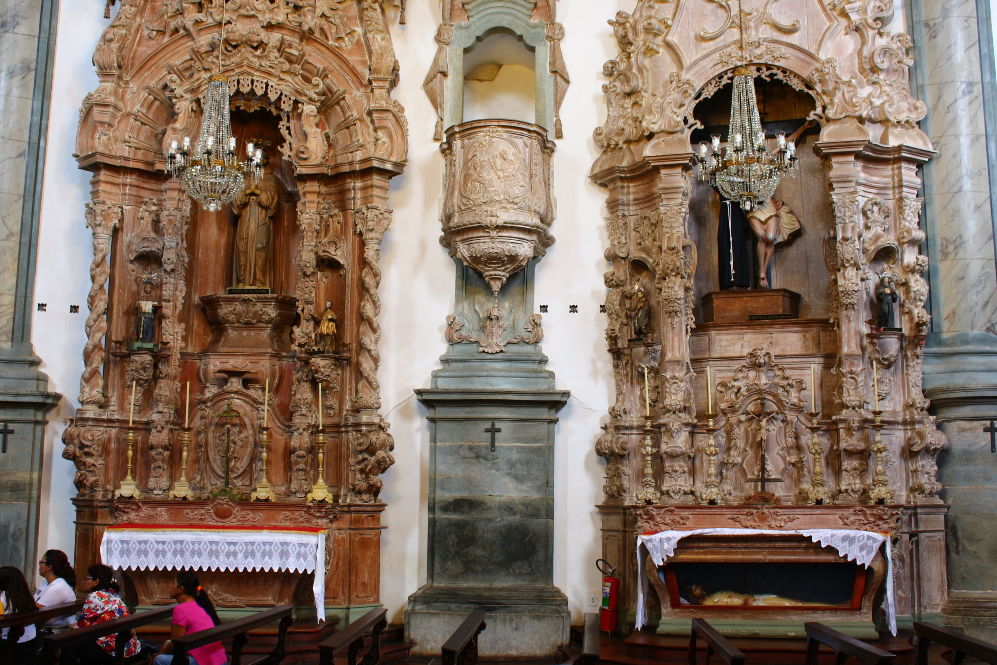 Igreja de São Francisco de Assis